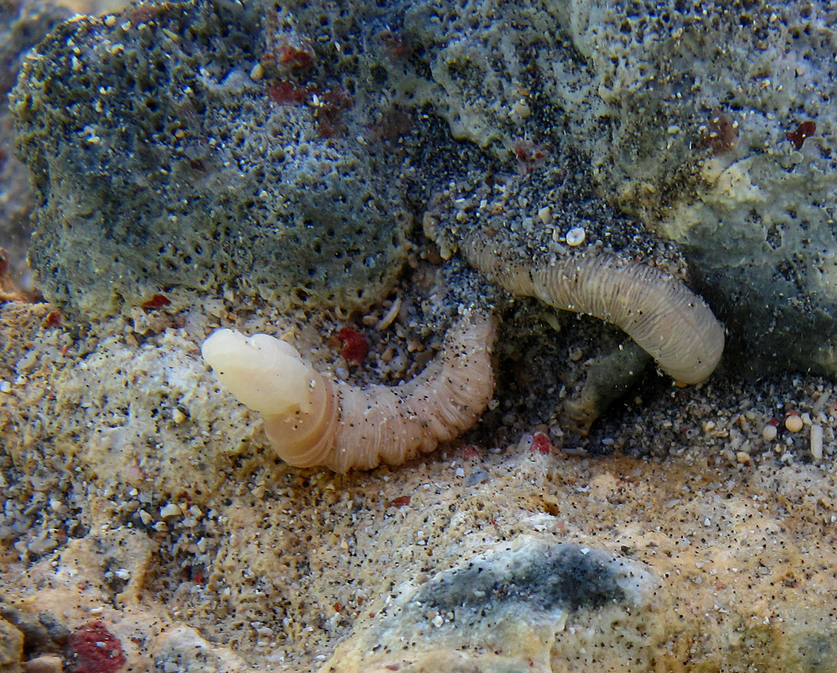 Un ver du genre Glossobalanus (entéropneustes) à la Réunion.